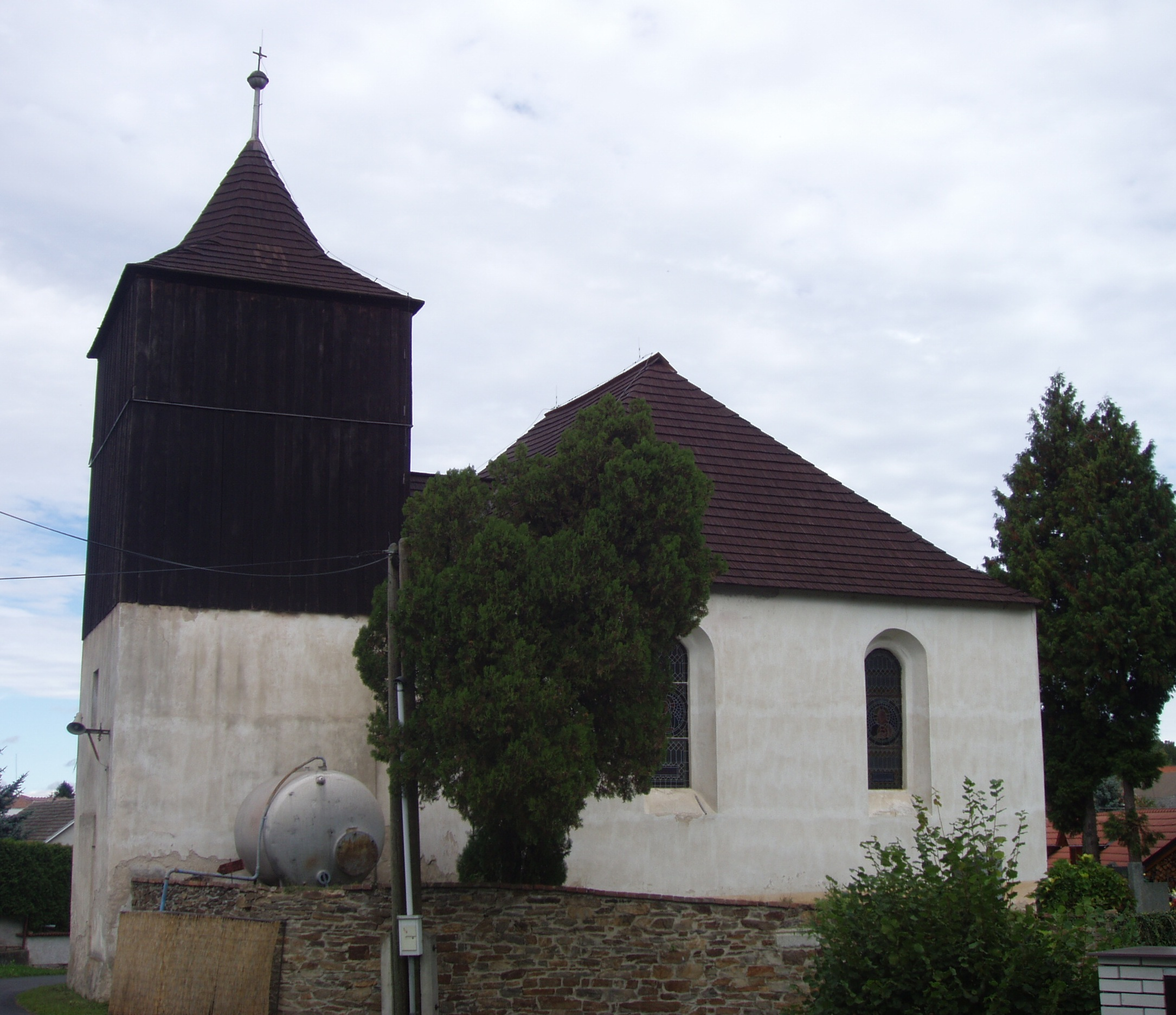 Kostel sv. Václava (Dobřeň), J část obce, Dobřeň